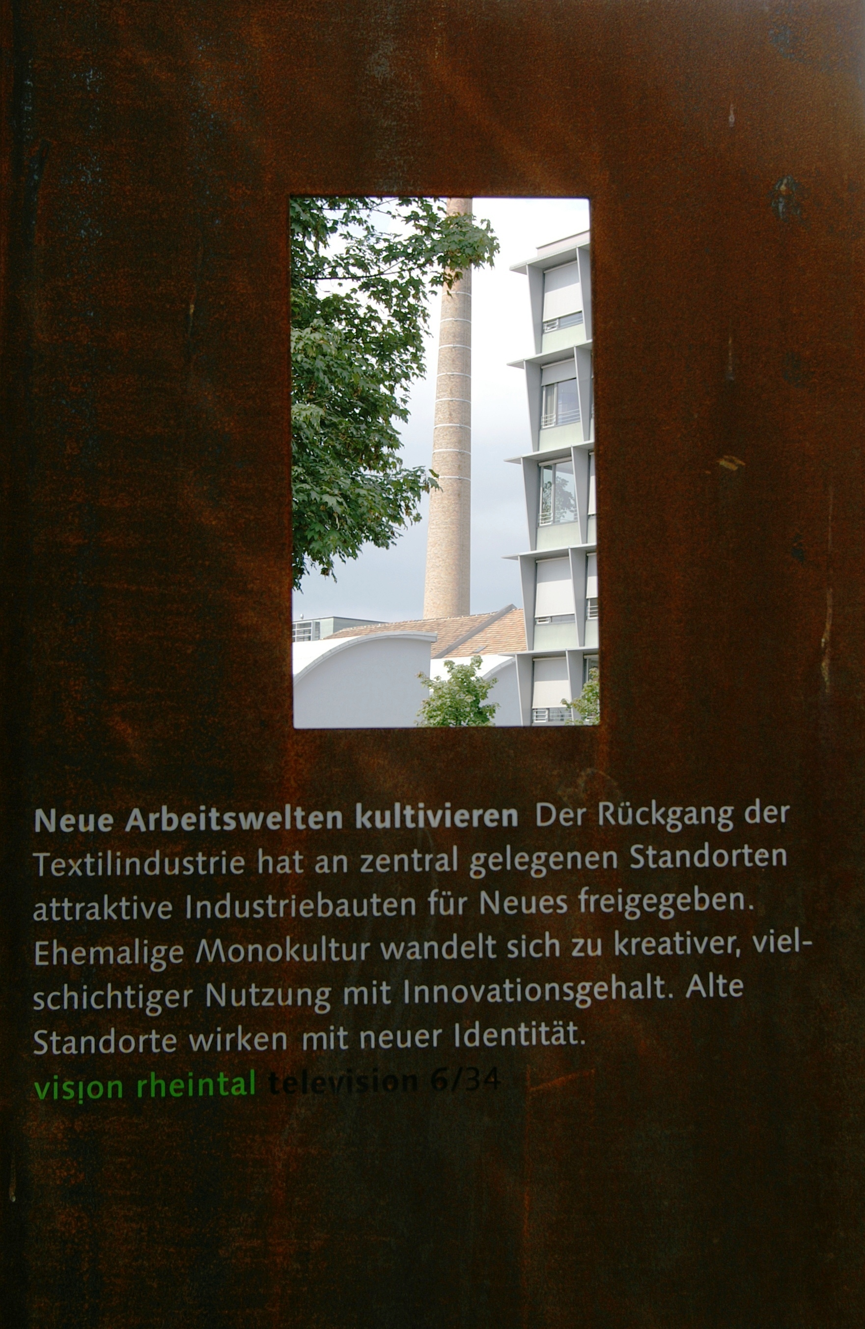 Färbers im (F.M. Rhomberg Areal) in Rohrbach in Dornbirn